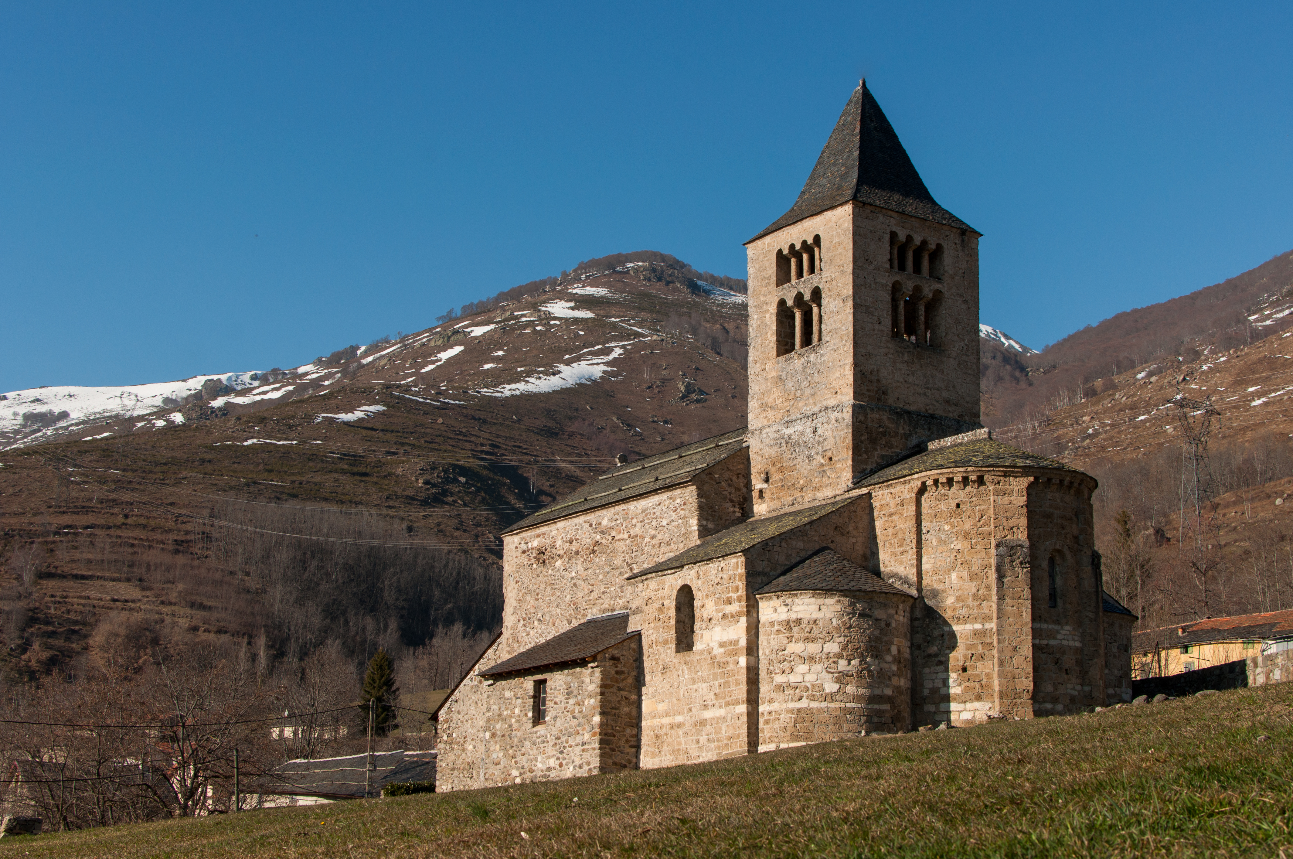 église d'Axiat (09)